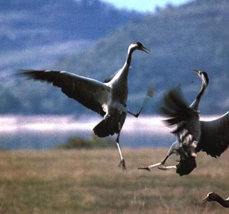 Zarihueyas